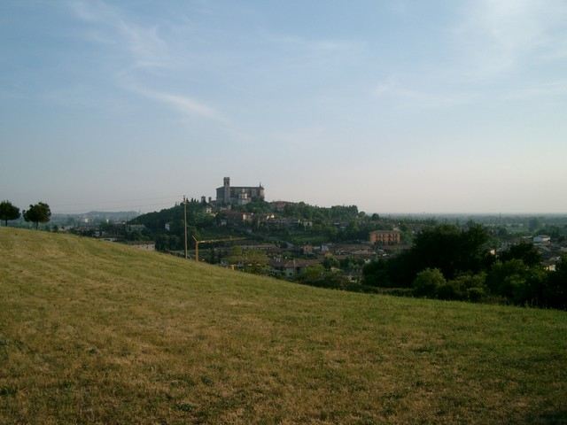 Calcinato - Al centro la chiesa parrocchiale di San VIncenzo